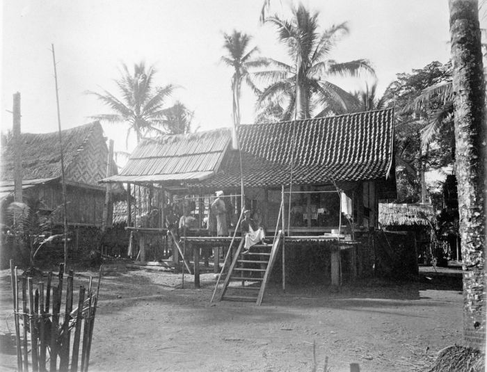 Foto. Deze foto is gemaakt tijdens de Sumatra Expeditie van 1877-1879. Landschappen uit de afdeeling Rawas.. Huis te Napal Litjin, in het district Rawas, Sumatra